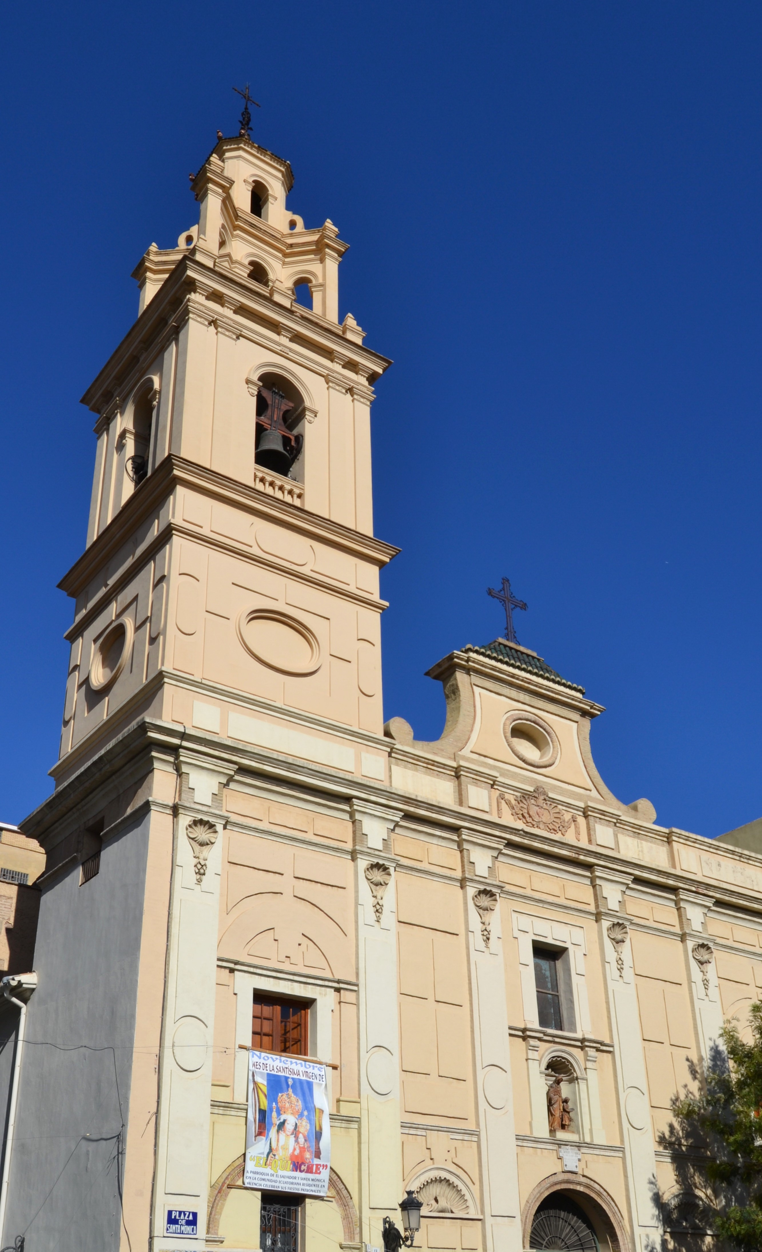 Església de santa Mònica de València, exterior.